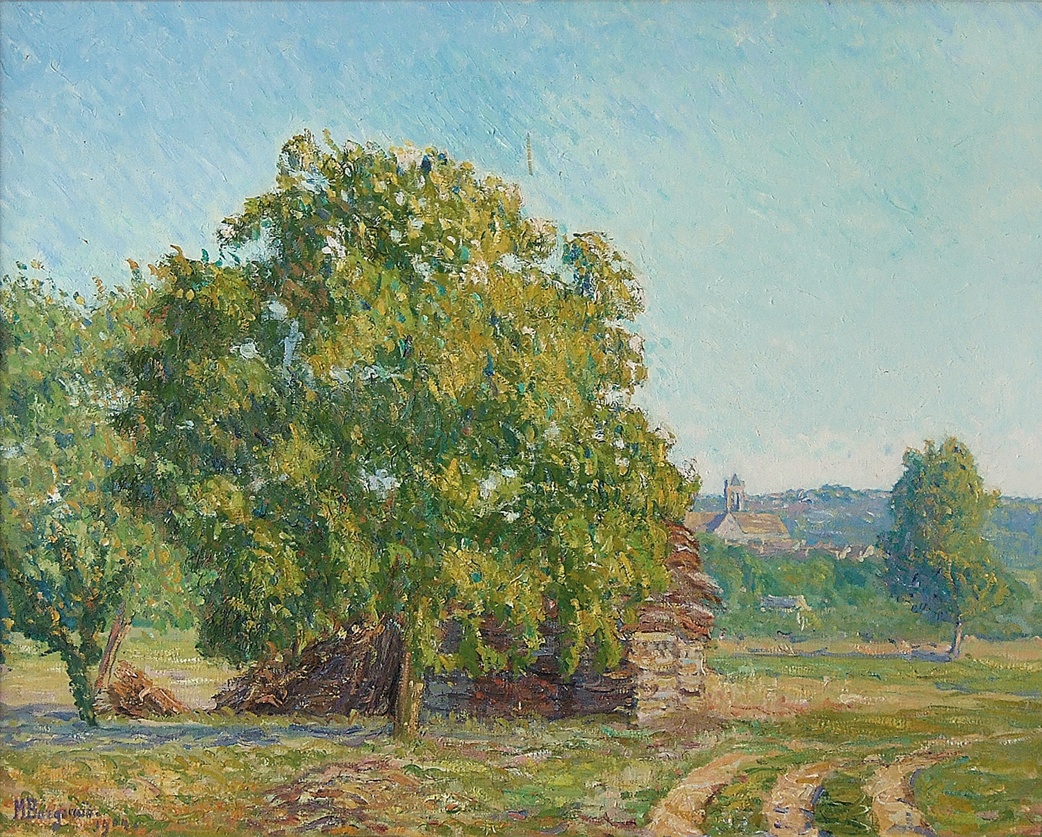 Paysage au bouquet d'arbre par le peintre suisse Marius Borgeaud, 1904, huile sur toile, no 5 du catalogue raisonné du peintre.